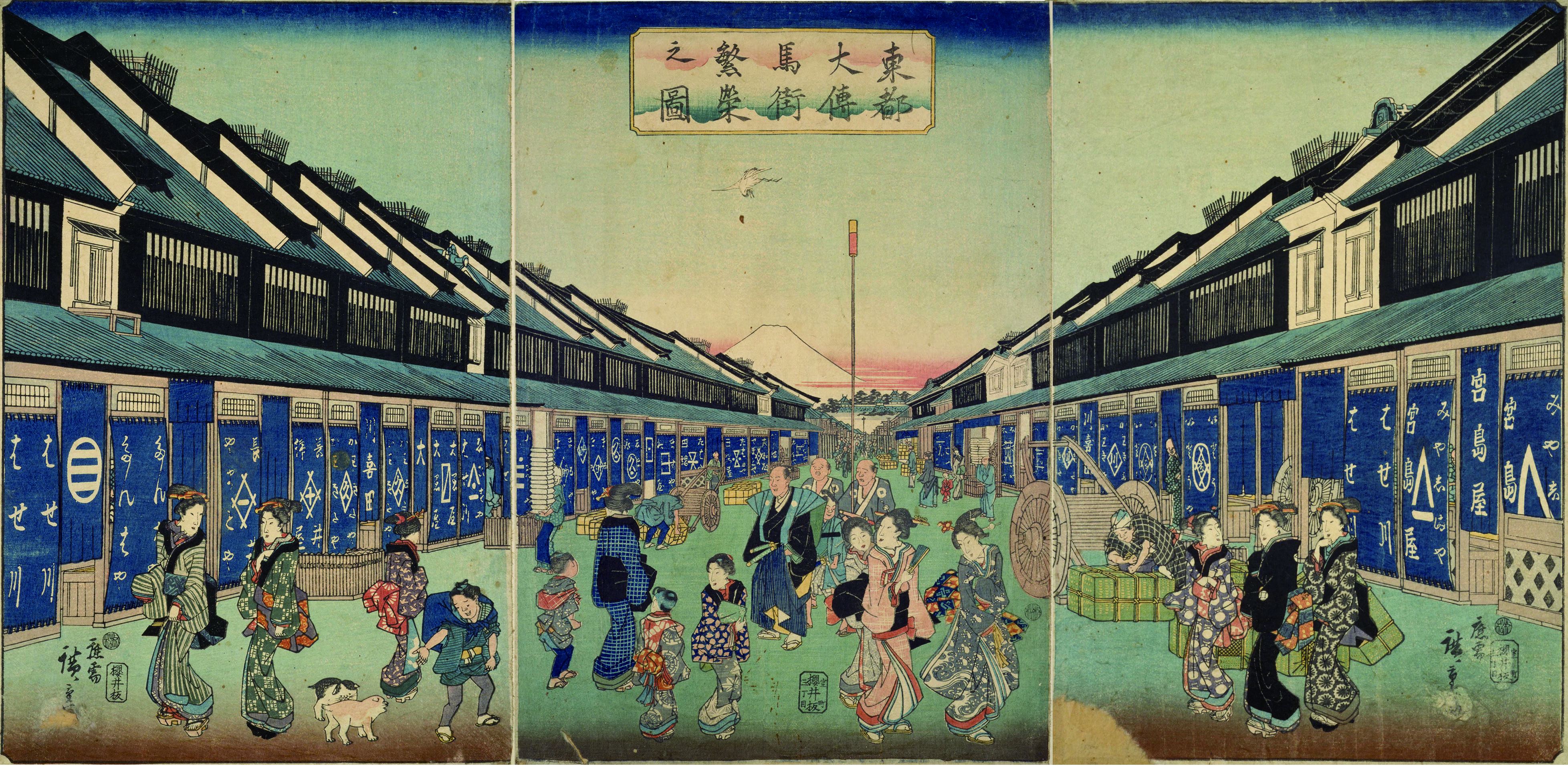 歌川広重作『東都大伝馬町繁栄之図』。国会図書館デジタルコレクションに収蔵されている三枚の画像を繋ぎ合わせたもの。